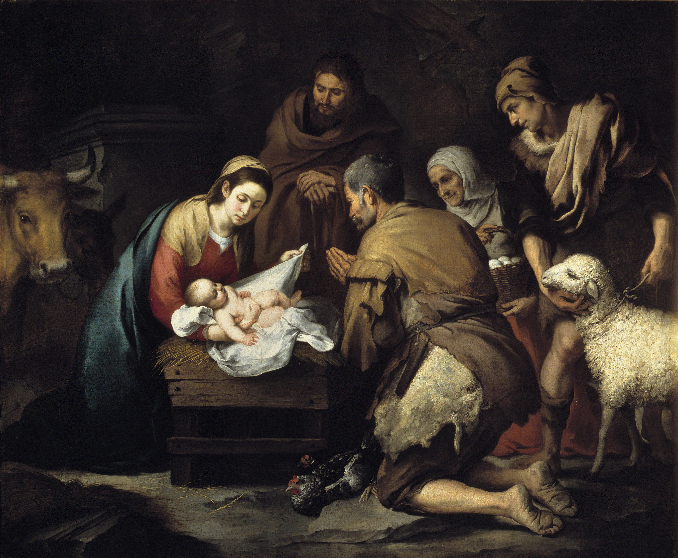 La obra representa el momento en que el Niño Jesús, que aparece desnudo y sostenido por su madre, la Virgen María, fue adorado por los pastores de Belén.